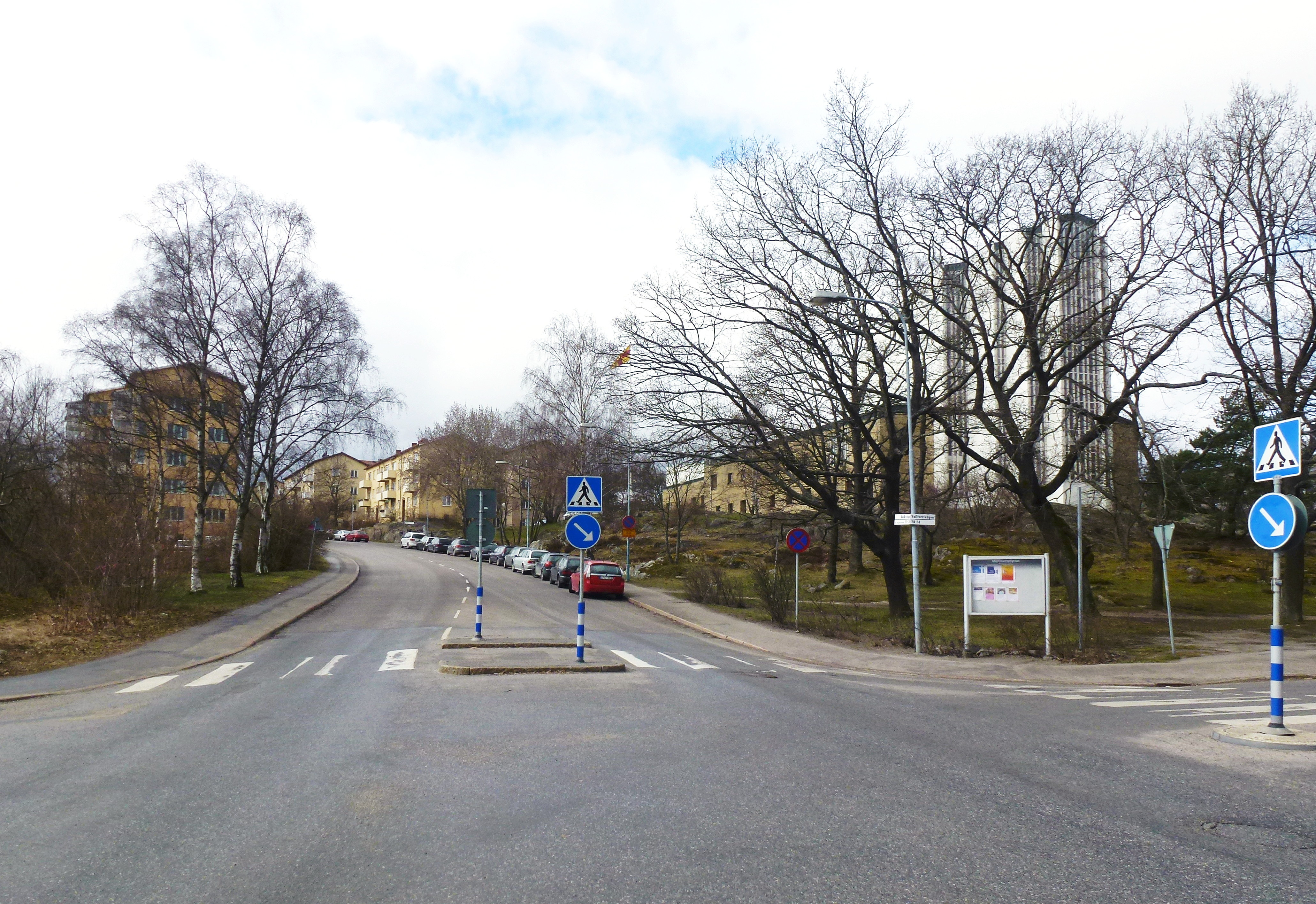 Uppenbarelsekyrkan, Bäckvägen, vy mot väst